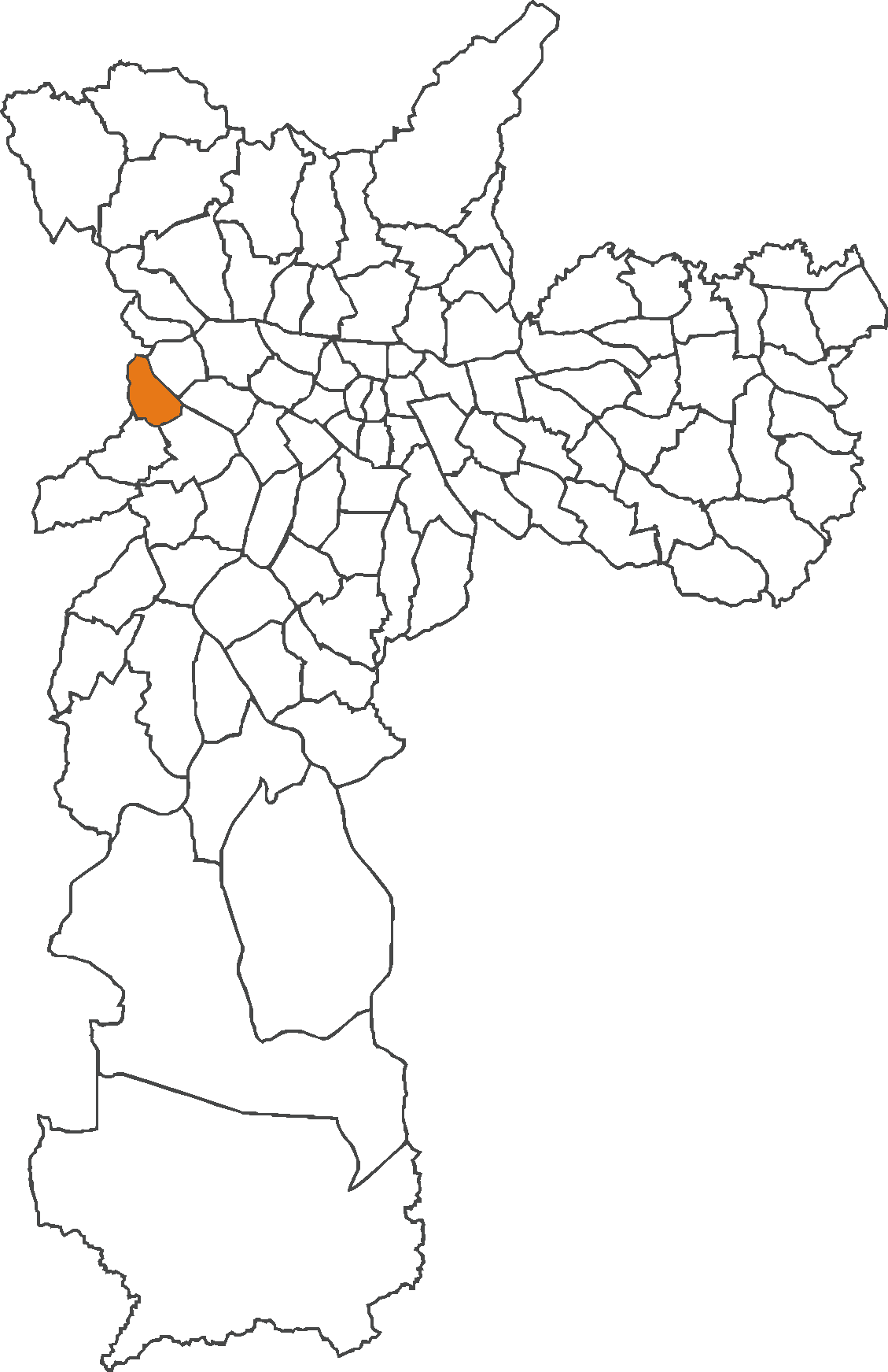 Localização do distrito de Jaguaré no município de São Paulo.